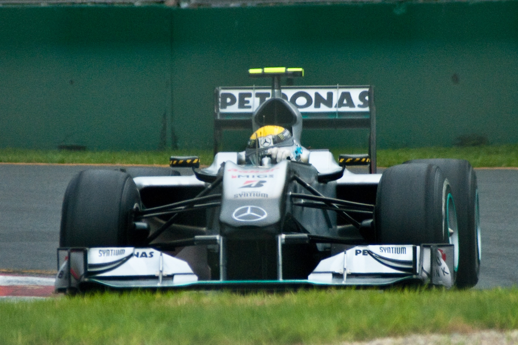 Rosberg in Melbourne